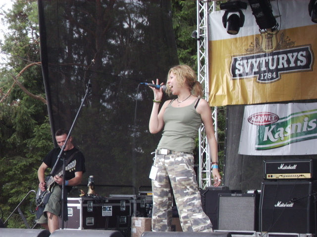 Ruination